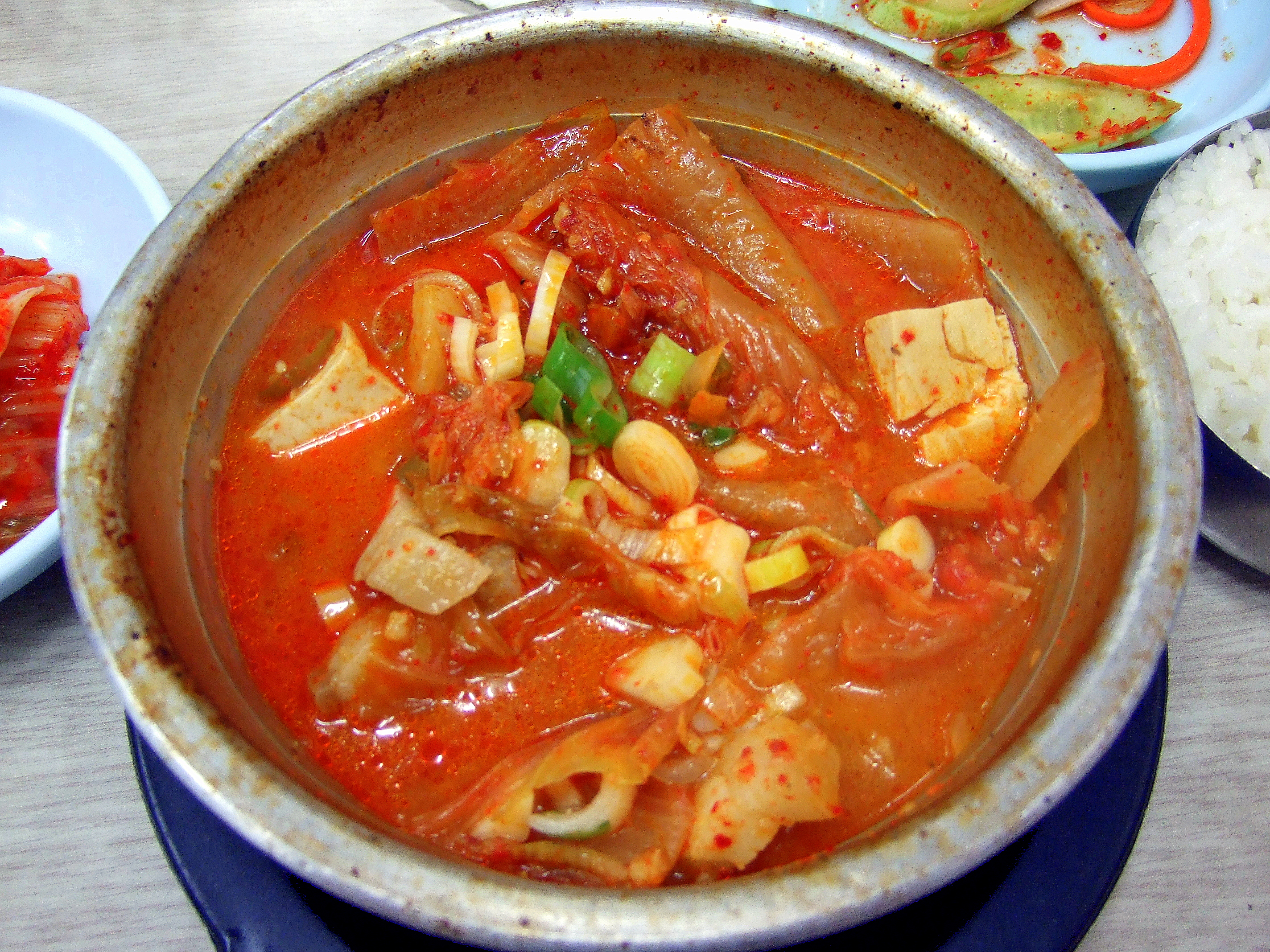 Korean stew-Kimchi jjigae